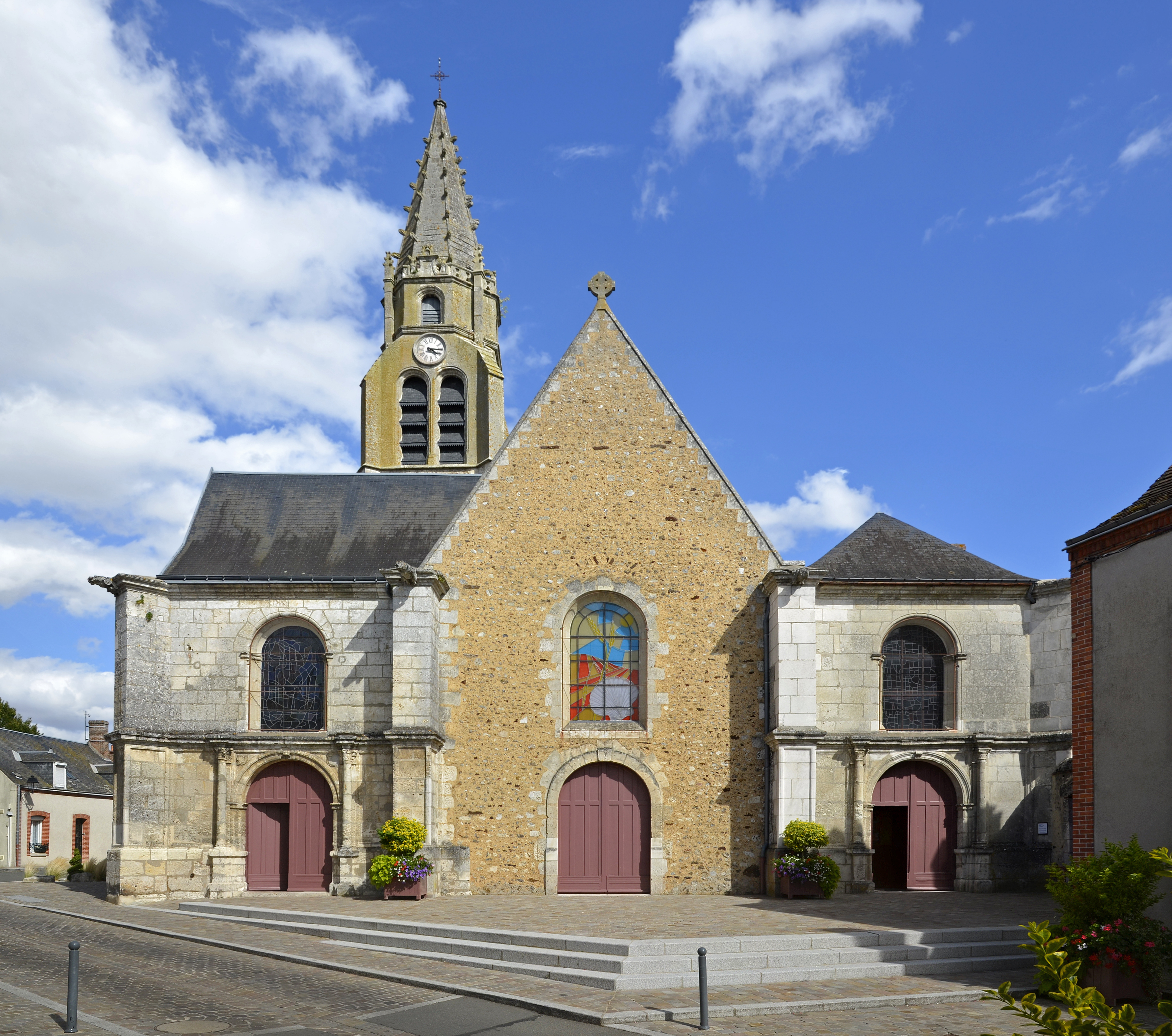 Église Saint-Georges de Cloyes-sur-le-Loir - Eure-et-Loir .